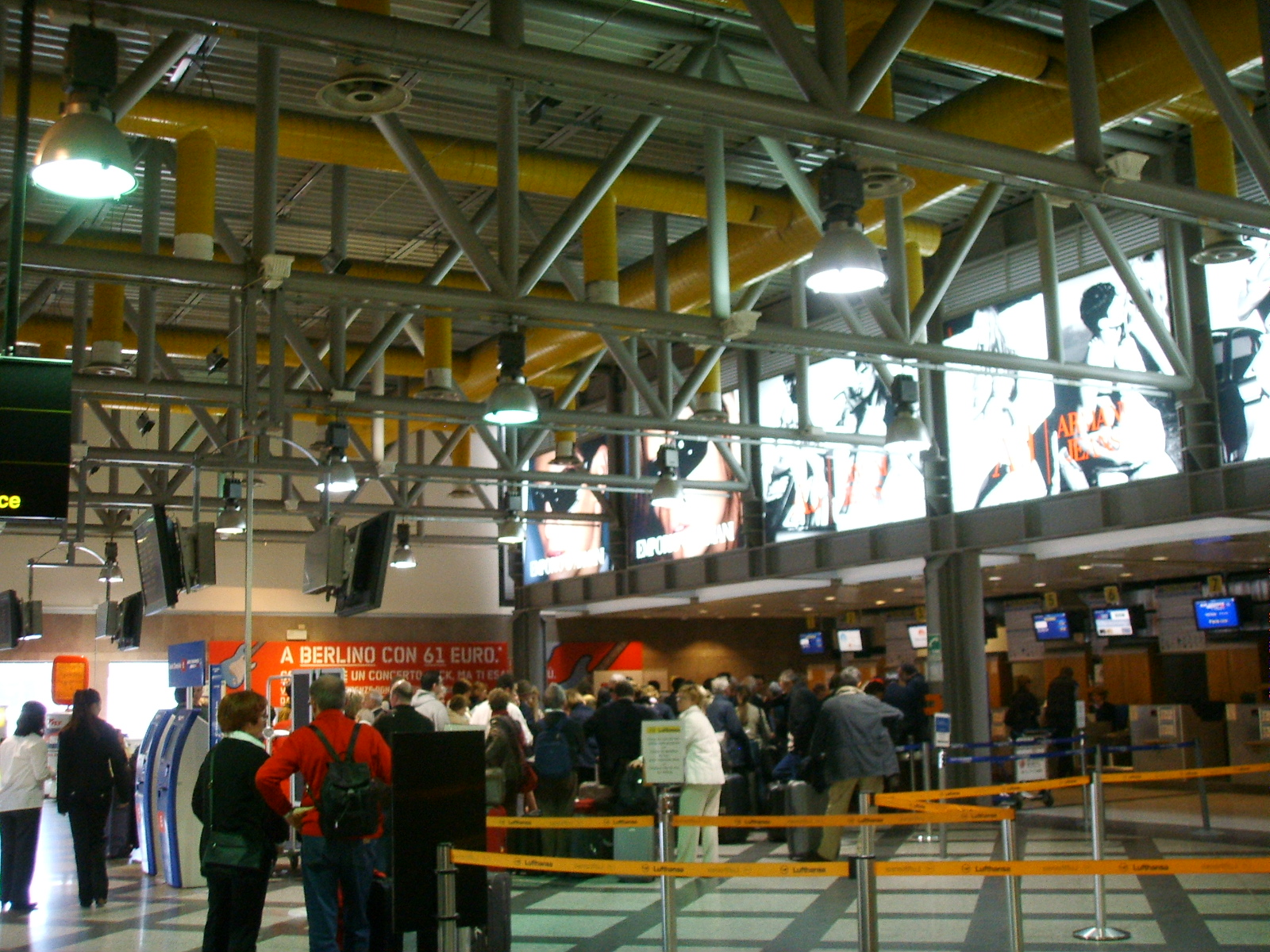 Aeroporto di Firenze check-in area.